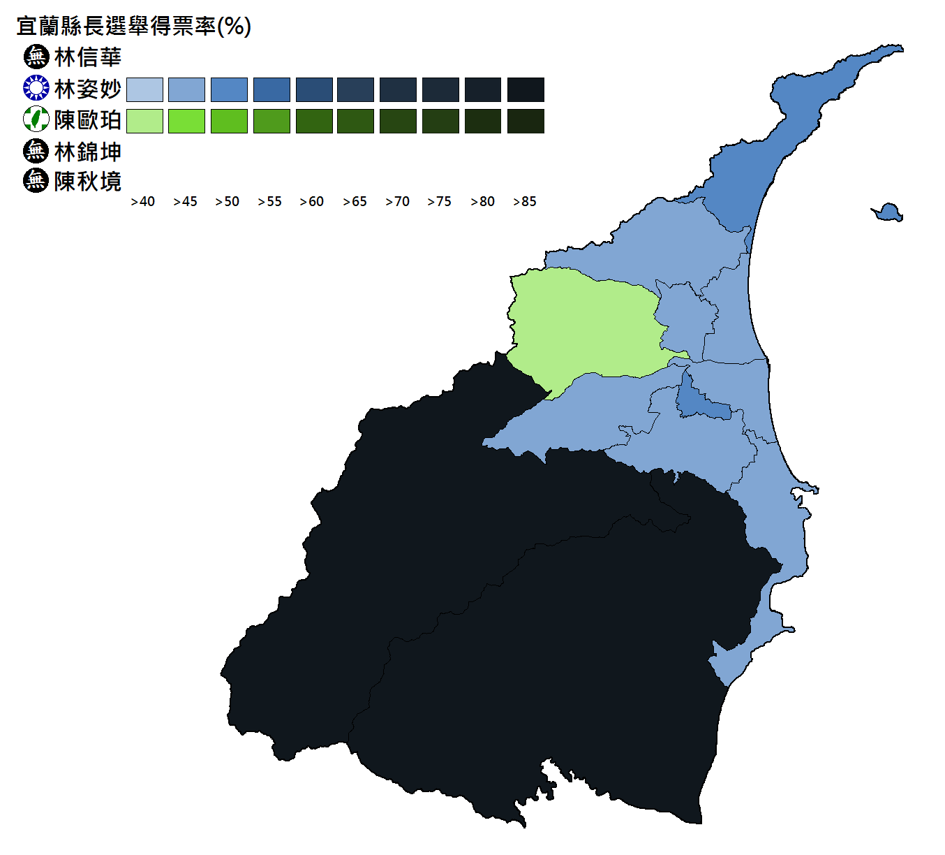 宜蘭縣長選舉得票分布。